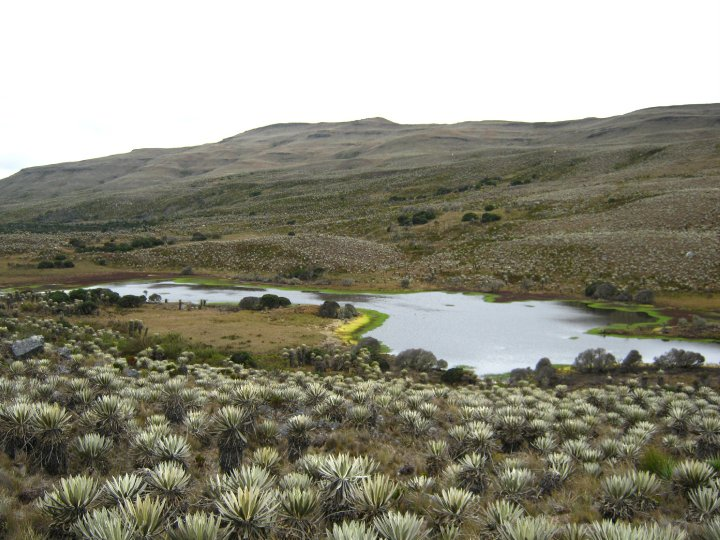 Esta fotografía fue tomada en el municipio colombiano con código 11001.